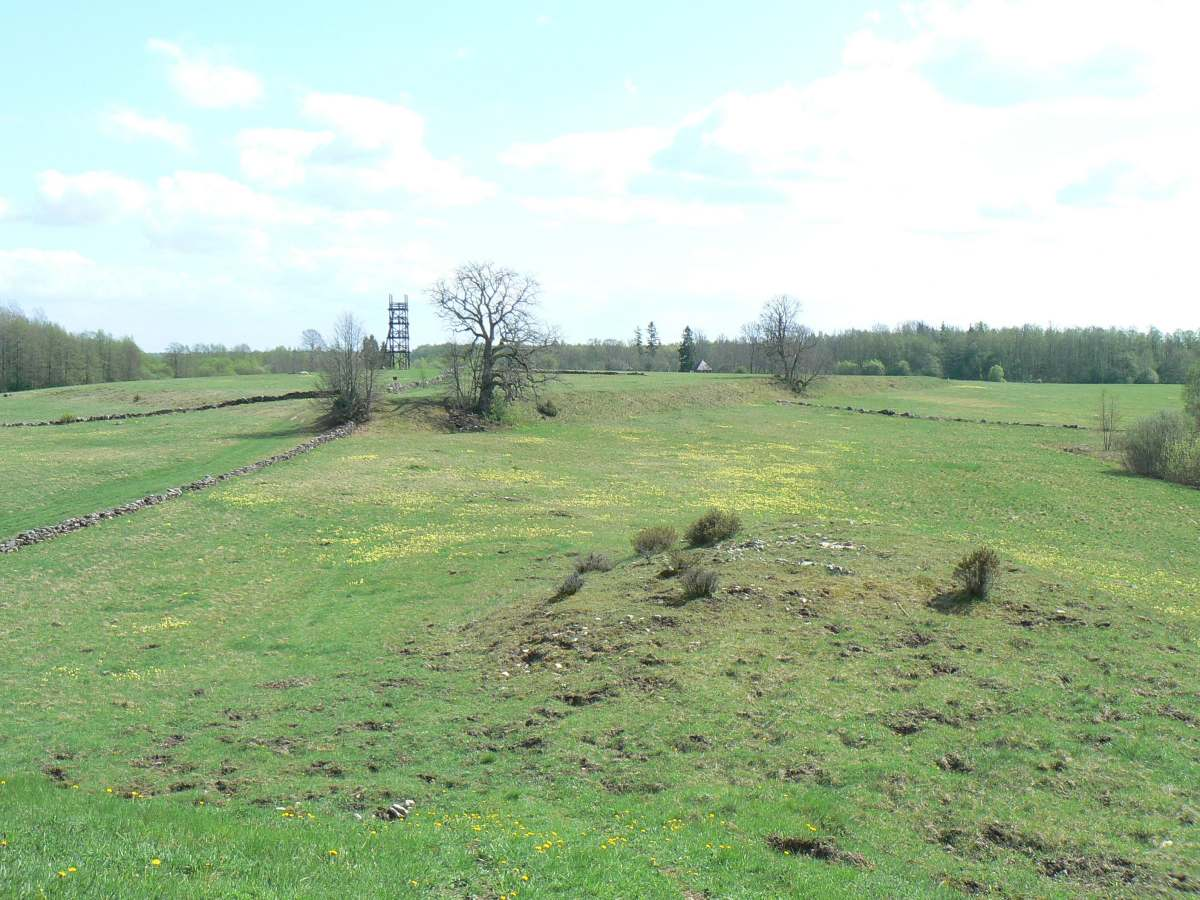 Maalinna soosaar linnusekünkalt